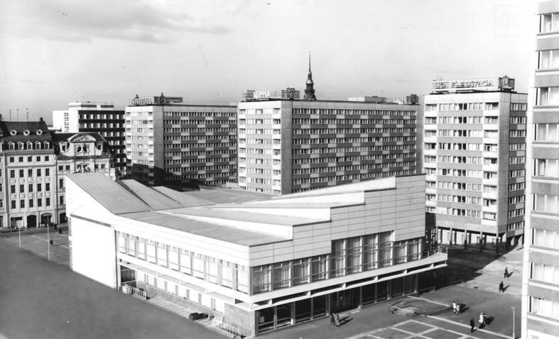 Leipzig, Sachsenplatz Zentralbild Kluge 14-11-1969 Leipzig: Neugestalteter Sachsenplatz-Die Gäste der XIII. Internationalen Dokumentar- und Kurzfilmwoche können sich von den enormen Leistungen der Leipziger Bauarbeiter überzeugen. Zu den Sehenswürdigkeiten gehört zweifellos der Sachsenplatz, der in unmittelbarer Nähe des historischen Marktes neu gestaltet wurde. Attraktion ist das eigenwillig konstruierte Gebäude von "Leipzig-Information" mit einem Eintrittskartenservice für alle kulturellen Veranstaltungen der Messestadt sowie einem Gastronomieservice. Außerdem stehen hier Vortragsräume zur Verfügung.